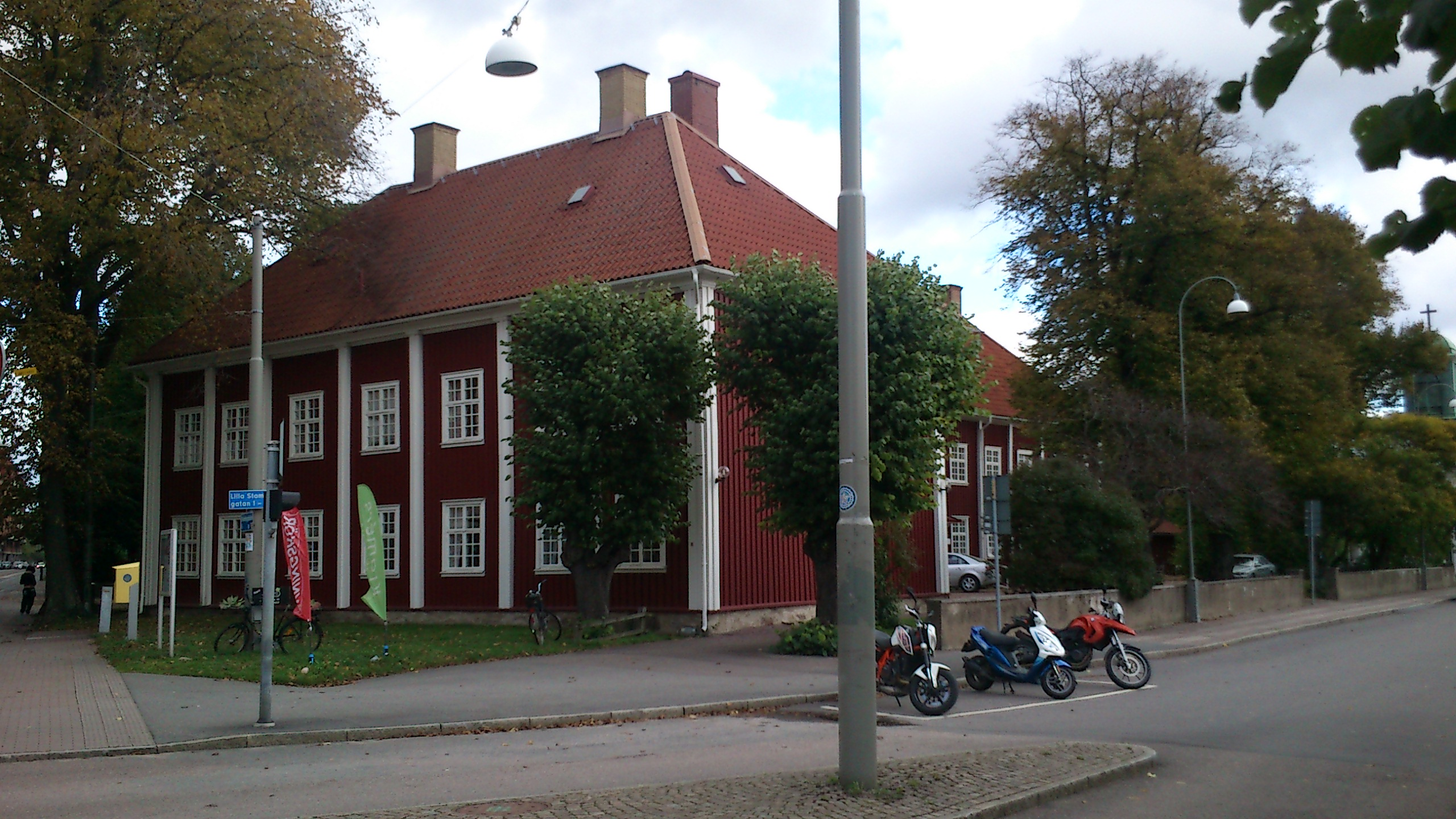 Gamla fattighuset (Stampen 11:14 f.d. Stångebro)